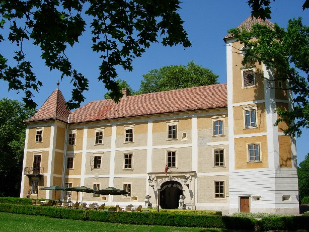 Khuen-Héderváry kastély